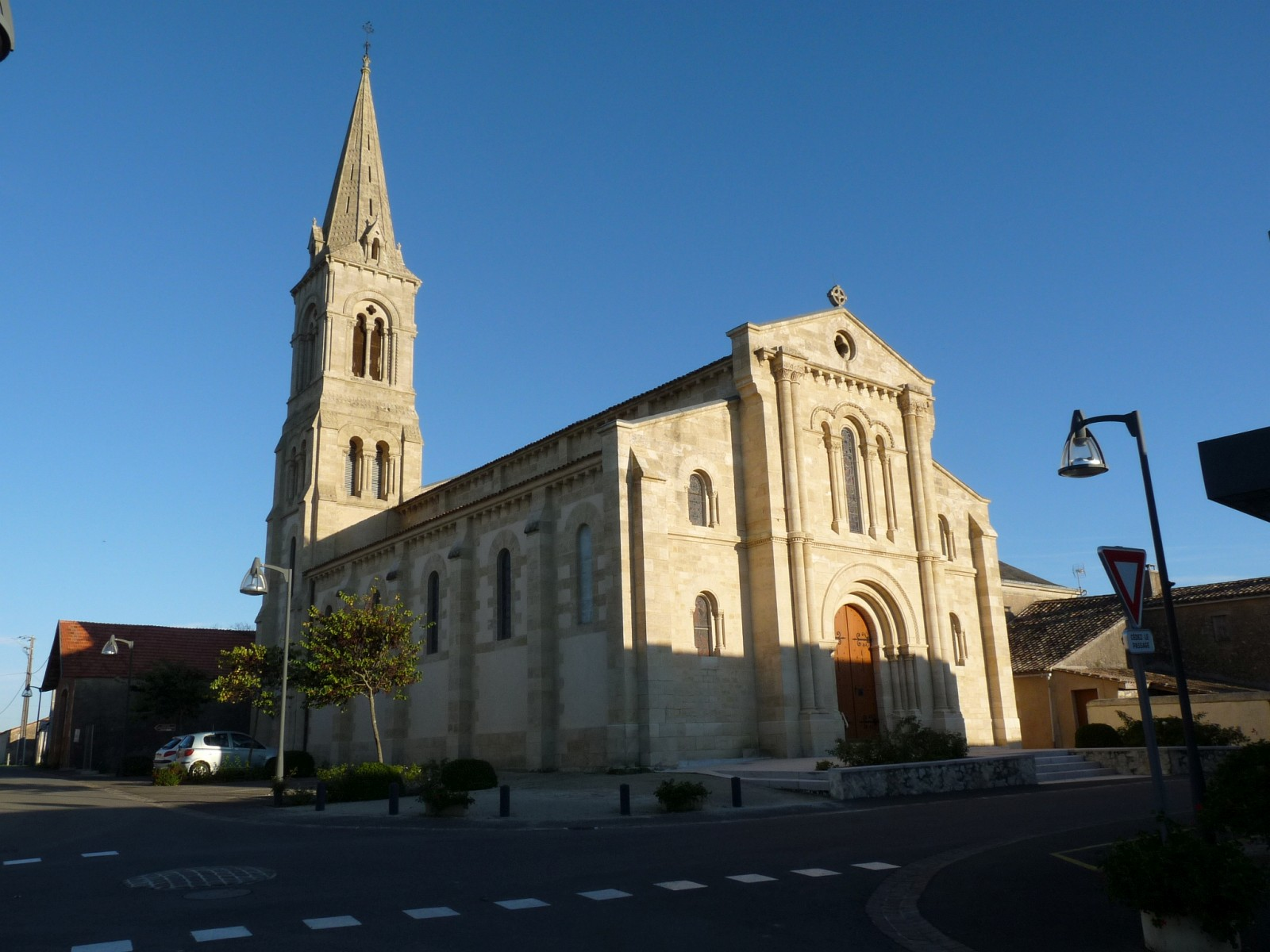 Eglise de Mazion, Gironde, France